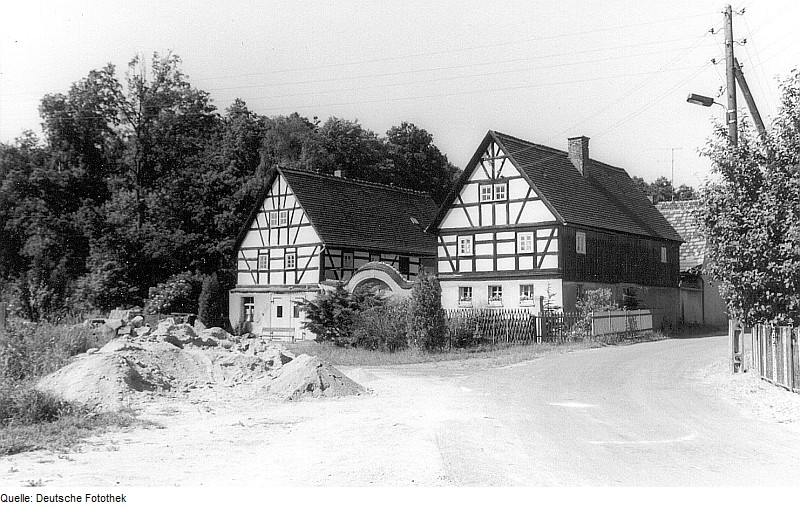 Original image description from the Deutsche Fotothek Ralbitz-Rosenthal-Zerna. Ehem. Schmiede